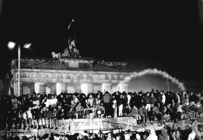 ADN-ZB-Reiche-1.1.90- Berlin: Brandenburger Tor- Silvesterfeier- Dicht gedrängt feierten tausende Berliner und ihre Gäste auf der Mauer am Brandenburger Tor ins neue Jahrzehnt hinein.